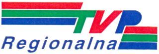 Logo TVP Regionalna z lat 1994-2002